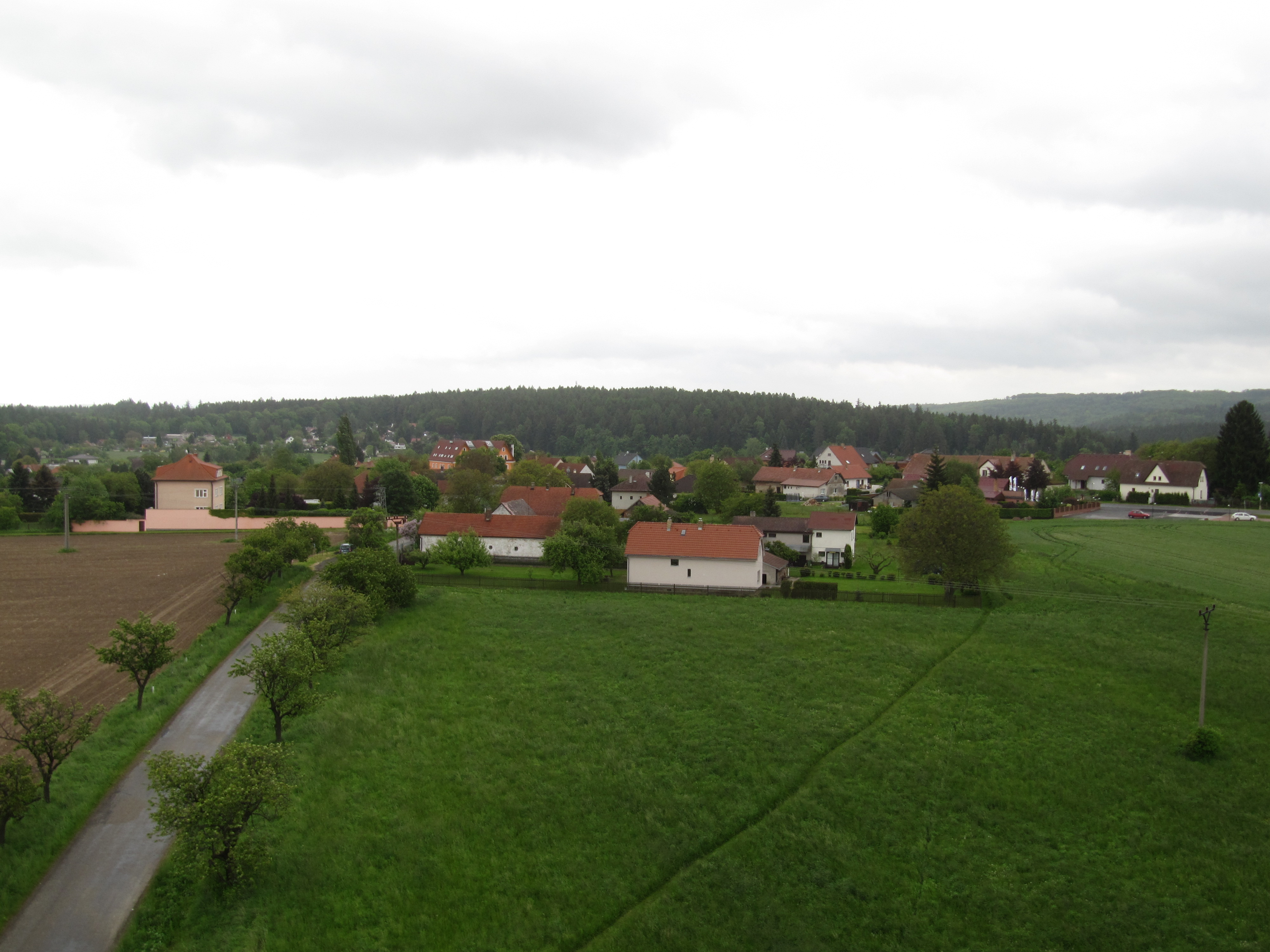 Vyžlovka, okres Praha-východ, Česká republika.